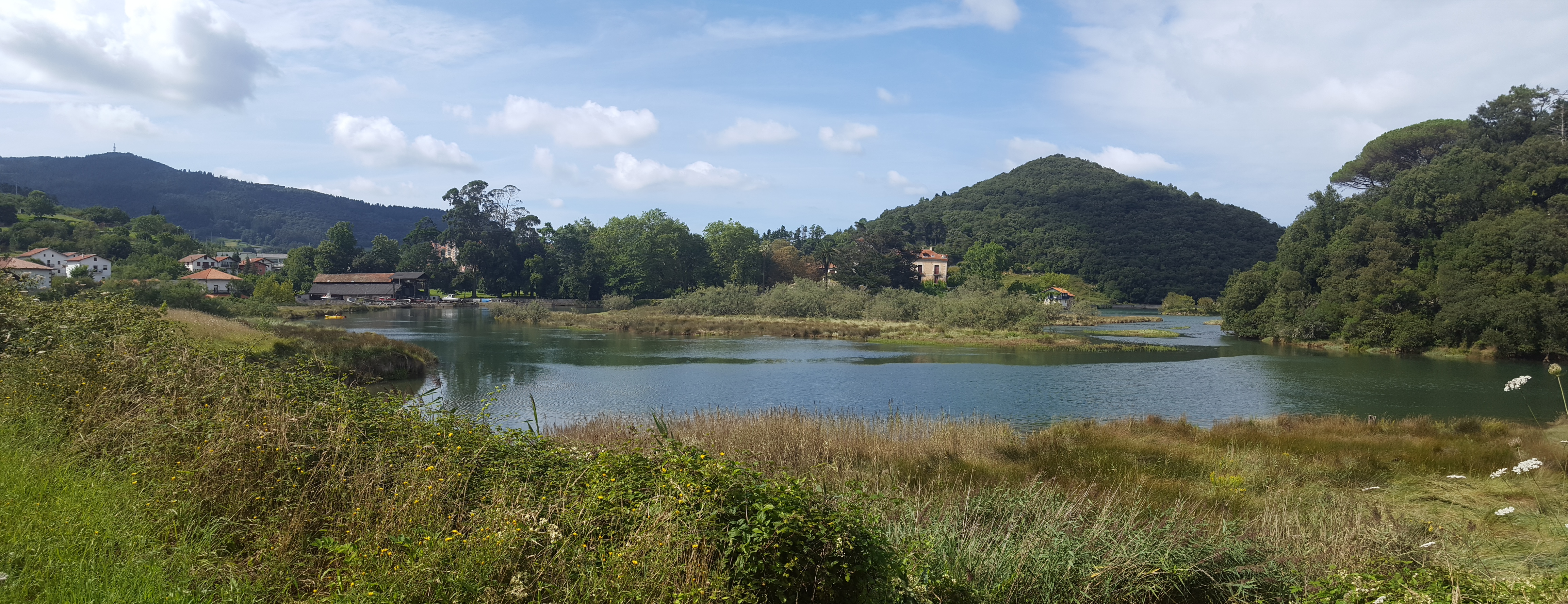 Lea ibaiaren padura Lekeitiora heldu baino lehenago. Urgoiti jauregia.